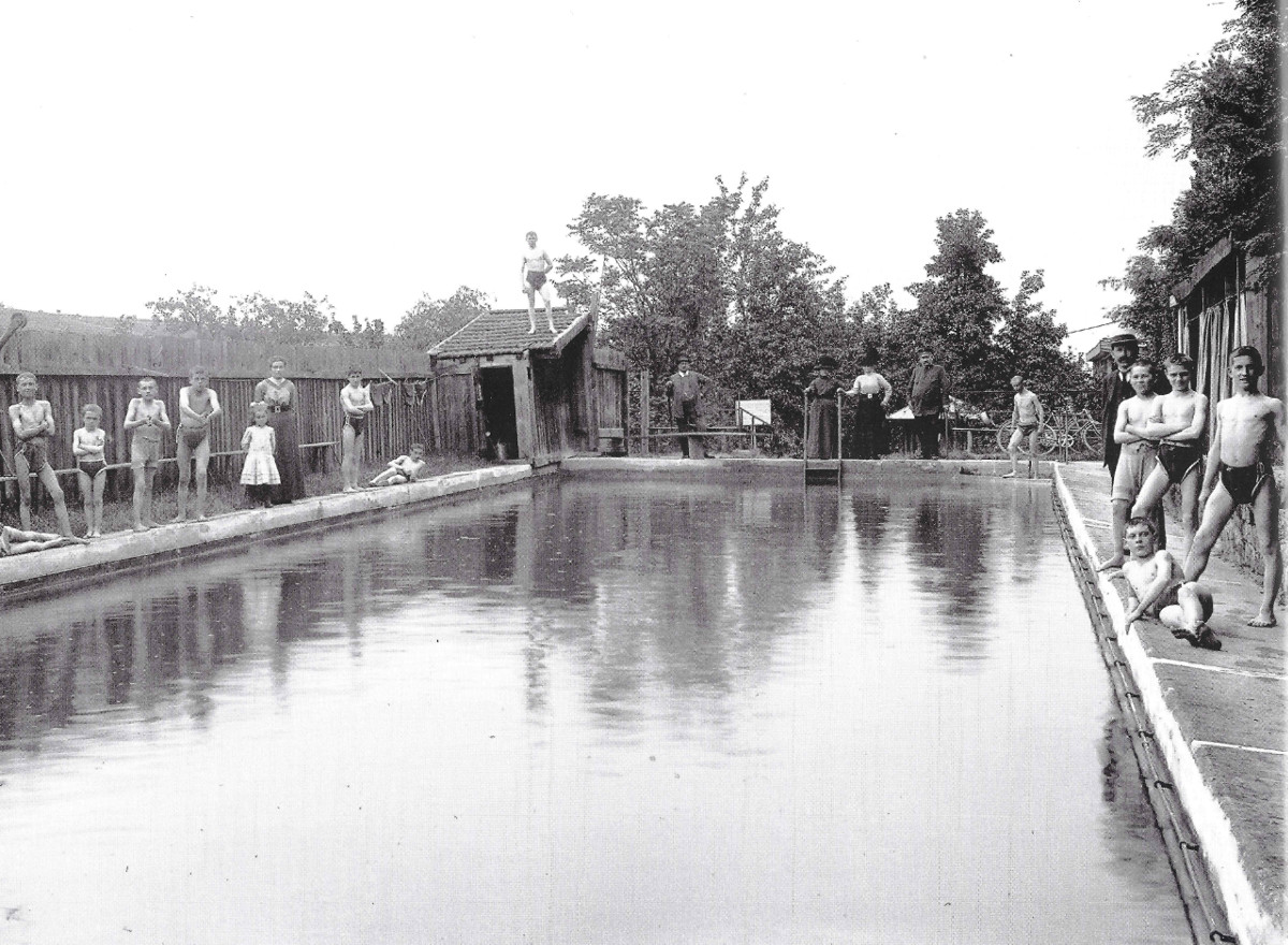 Das Deidesheimer Schwimmbad, das erste der Pfalz, um 1910